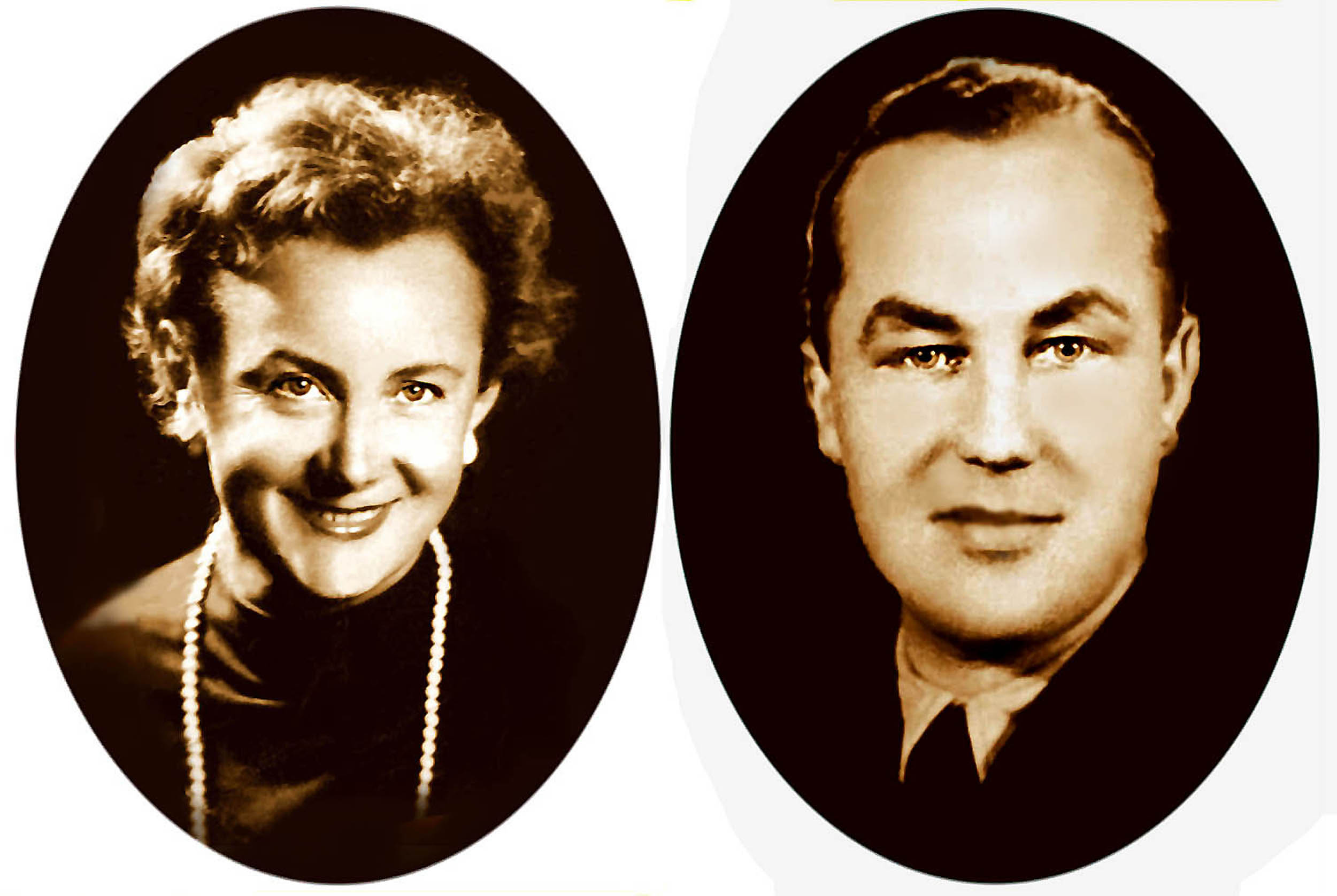 Jolanta, Władysław, rodzice Zdzisława Otella Horodeckiego.Archiwum rodzinne.Foto w owalu, sepiowe.Wykonane 70 lat temu.Ze zbioru prywatnego rodzinnego.Ja jedyny właściciel i dysponent upubliczniam tę pracę ponownie 25.10.2018